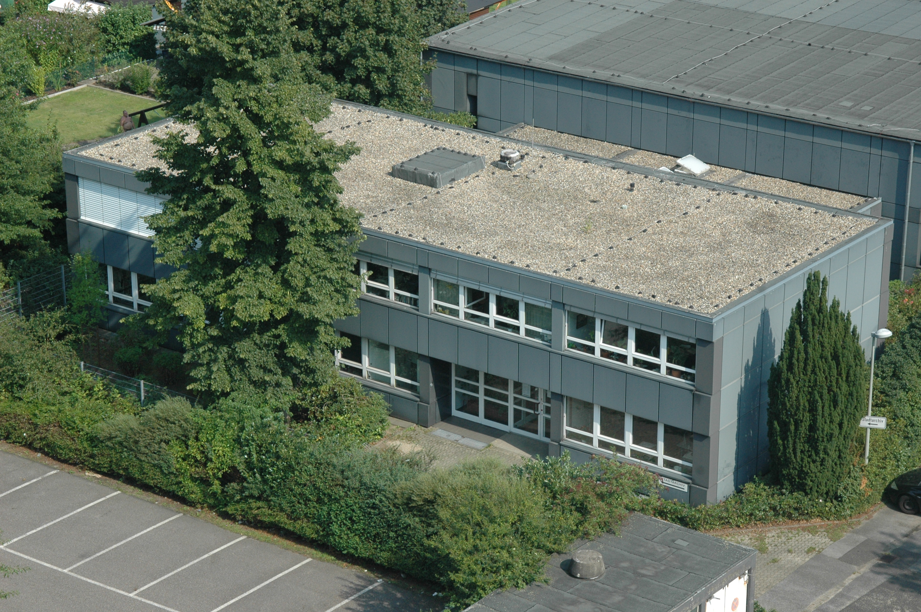 Verwaltungsgebäude des Stadtarchivs Krefeld, aufgenommen vom Dach des Stadthauses aus